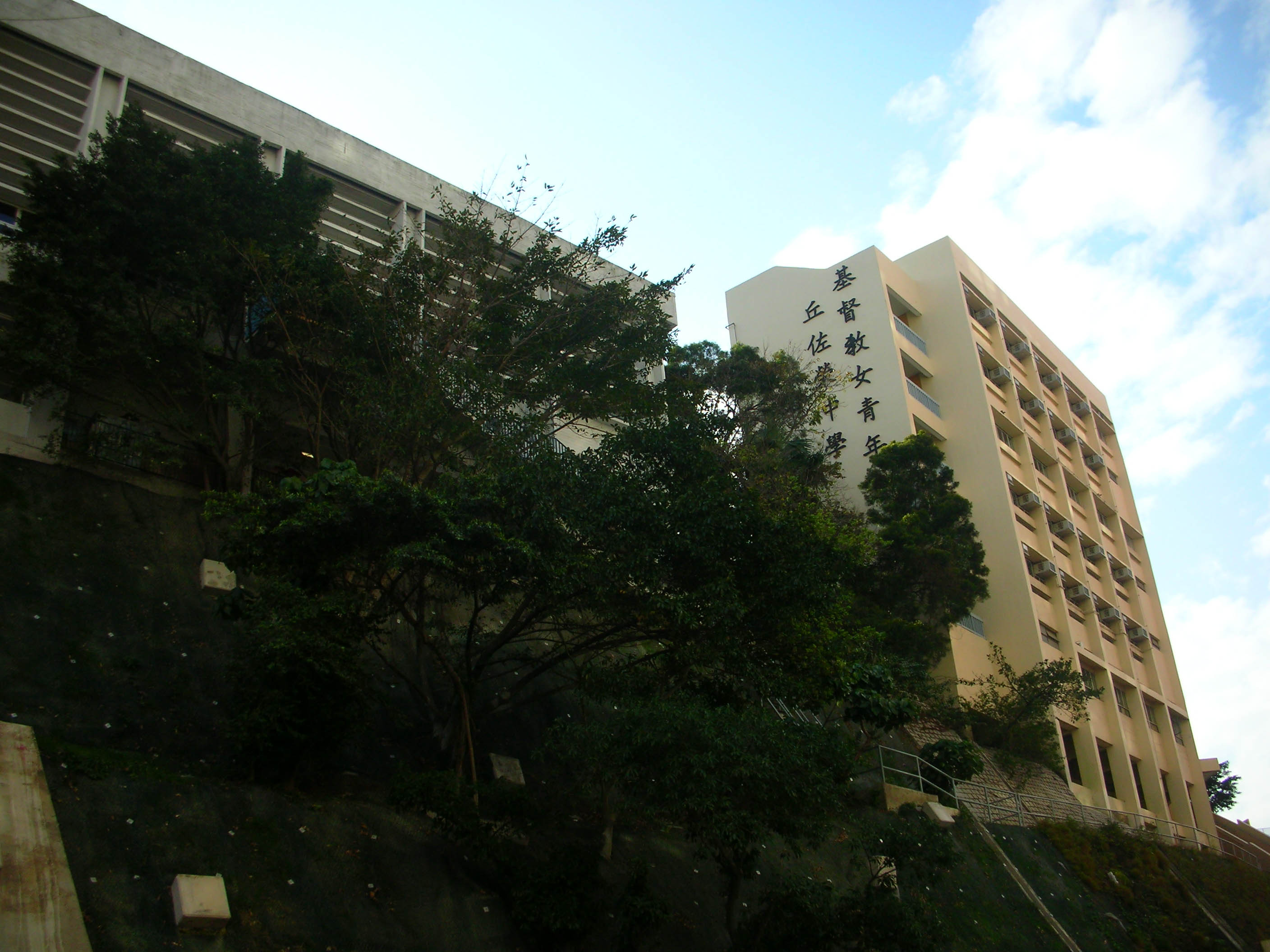 Y.W.C.A. Hioe Tjo Yoeng College, Ho Man Tin, Hong Kong 基督教女青年會丘佐榮中學，位於香港何文田。